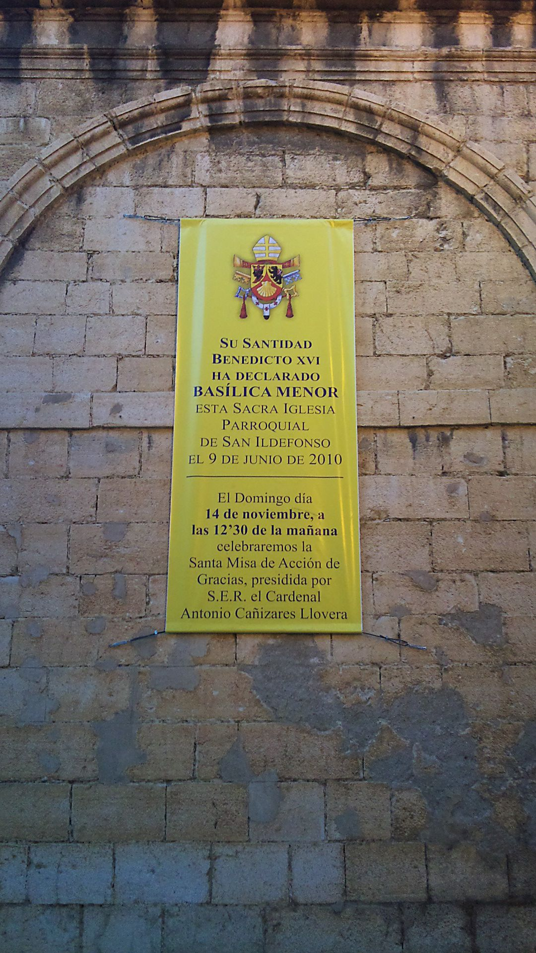 Cartel anunciador de la declaración del templo como Basílica Menor por parte de S.S. Benedicto XVI y la celebración de la Misa de Acción de Gracias a cargo de Antonio Cardenal Cañizares Llovera. Colocado en el primer cuerpo de la torre.